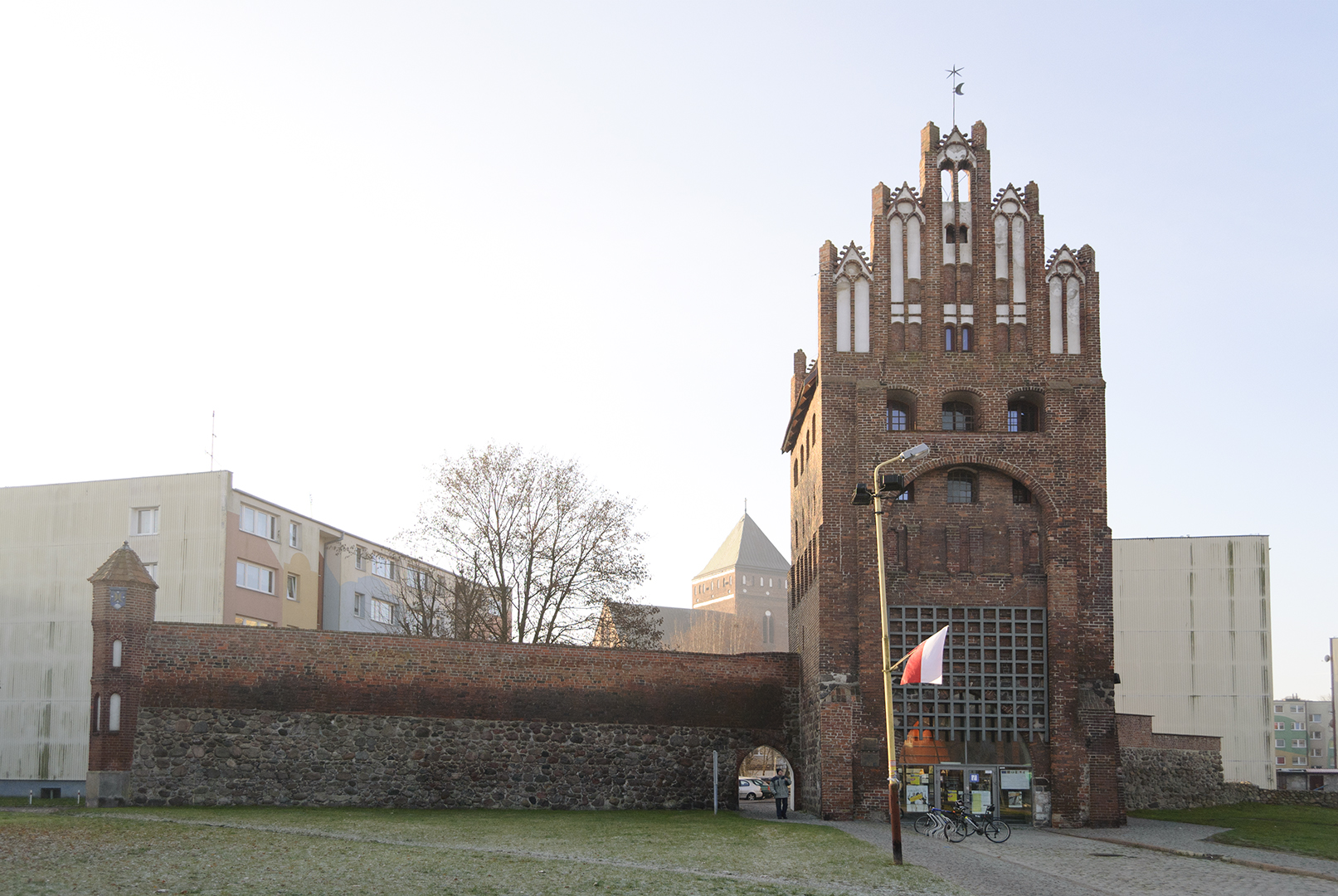 Goleniów, Brama Wolińska, ob. dom kultury, XIV, XV